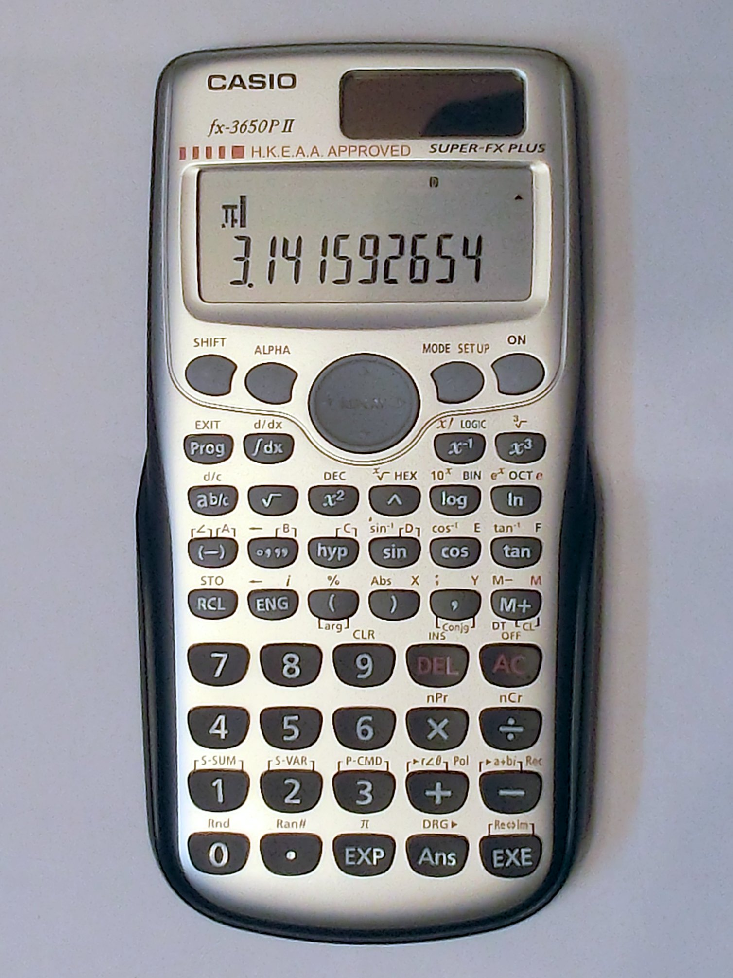 中文（香港）: Casio fx-3650P II